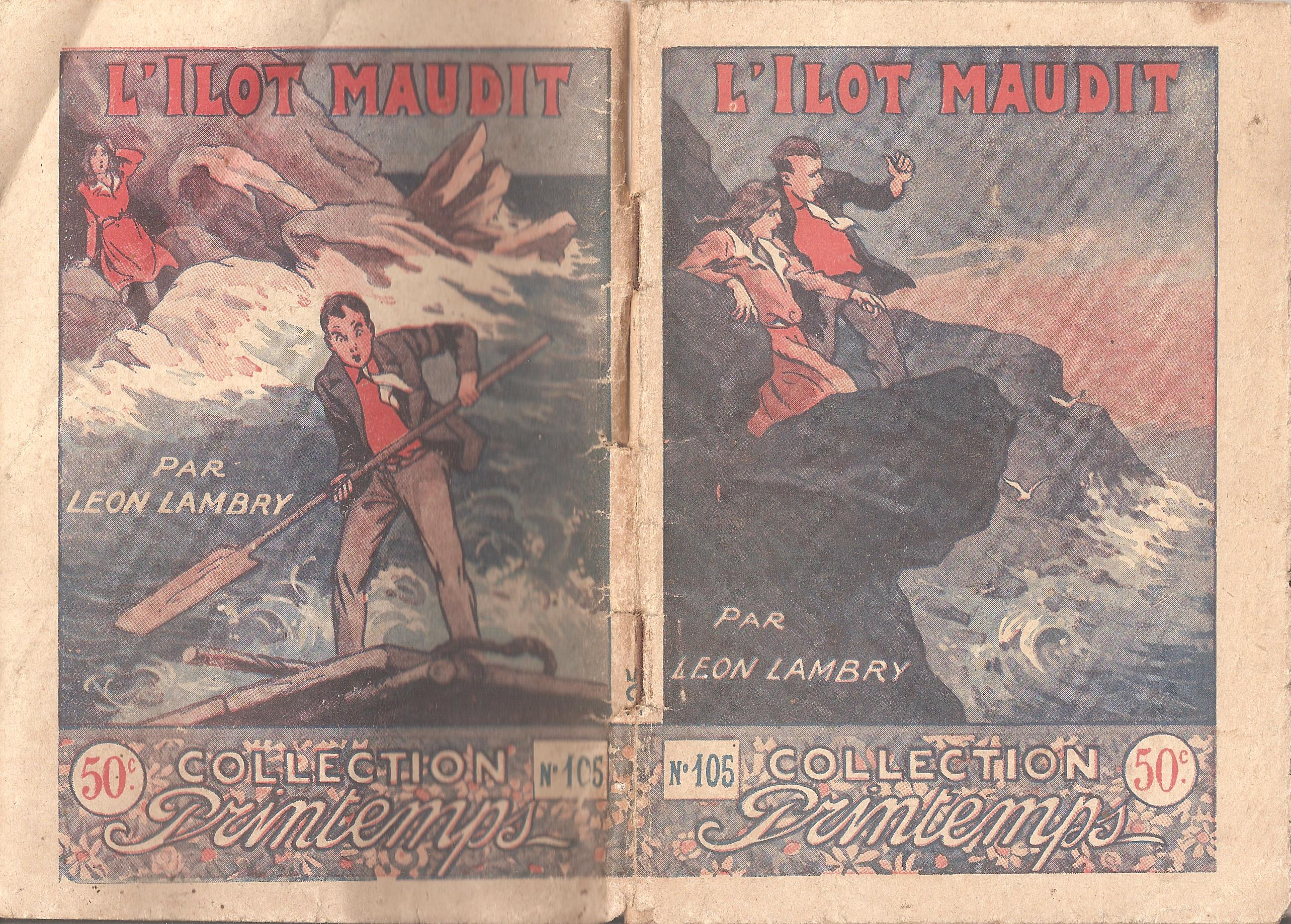 Roman pour la jeunesse L'Ilôt maudit de Léon Lambry, n° 105 dans la collection Printemps des éditions de Montsouris, illustration Henri Ferran, paru en 1932